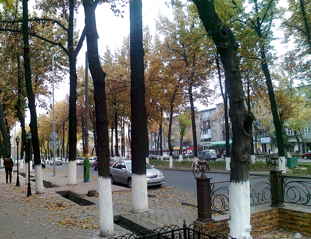 Улица Туркестанская в г. Шымкент. Важные объекты: административное здание "АО Казахтелеком", торговый район "Спутник", станция пожарной службы, Областная клиническая больнца, сквер отдыха, православная церковь и др.